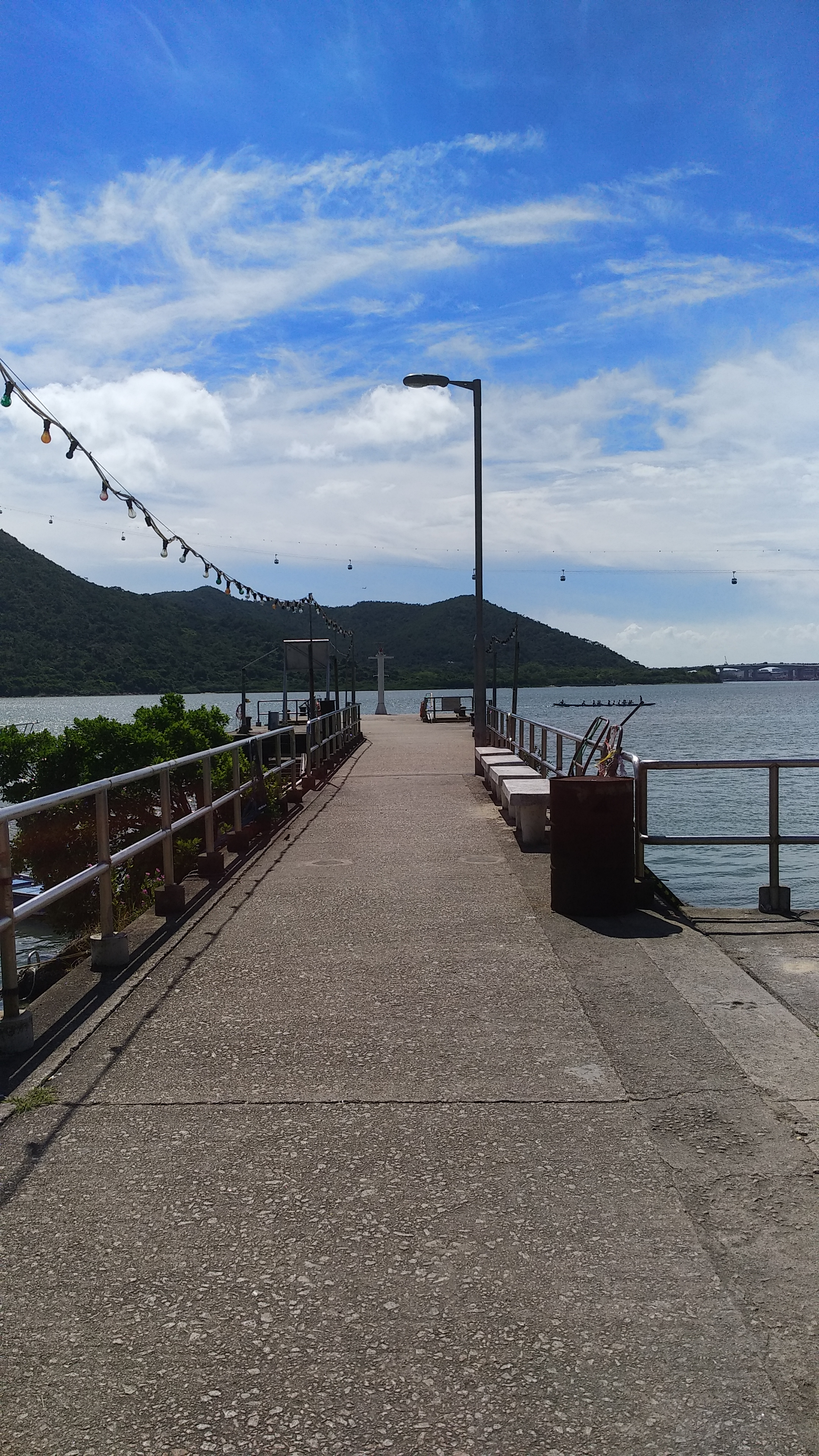 中文（香港）: 香港東涌西部馬灣涌公眾碼頭